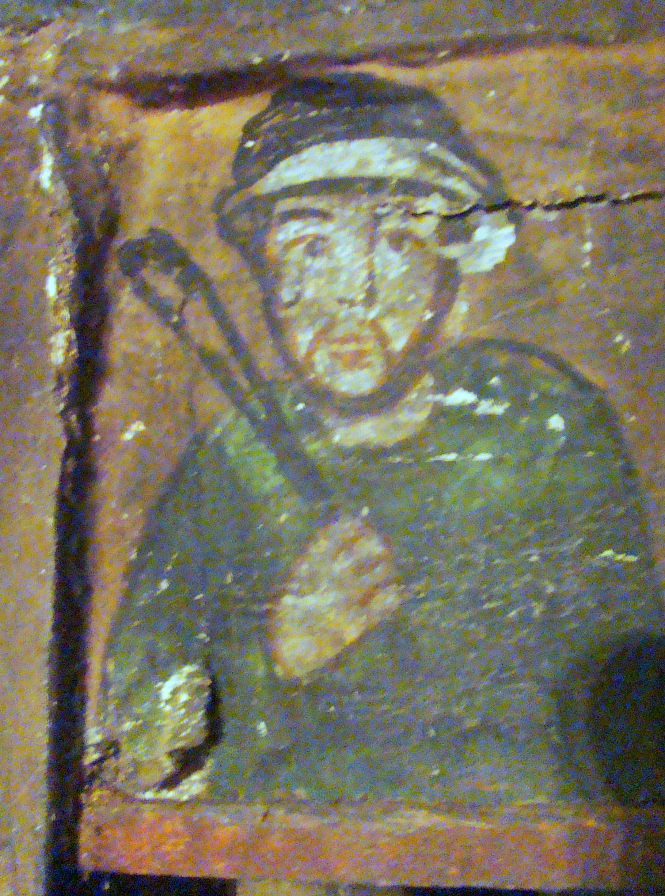 Biserica de lemn „Sf. Ierarh Nicolae”